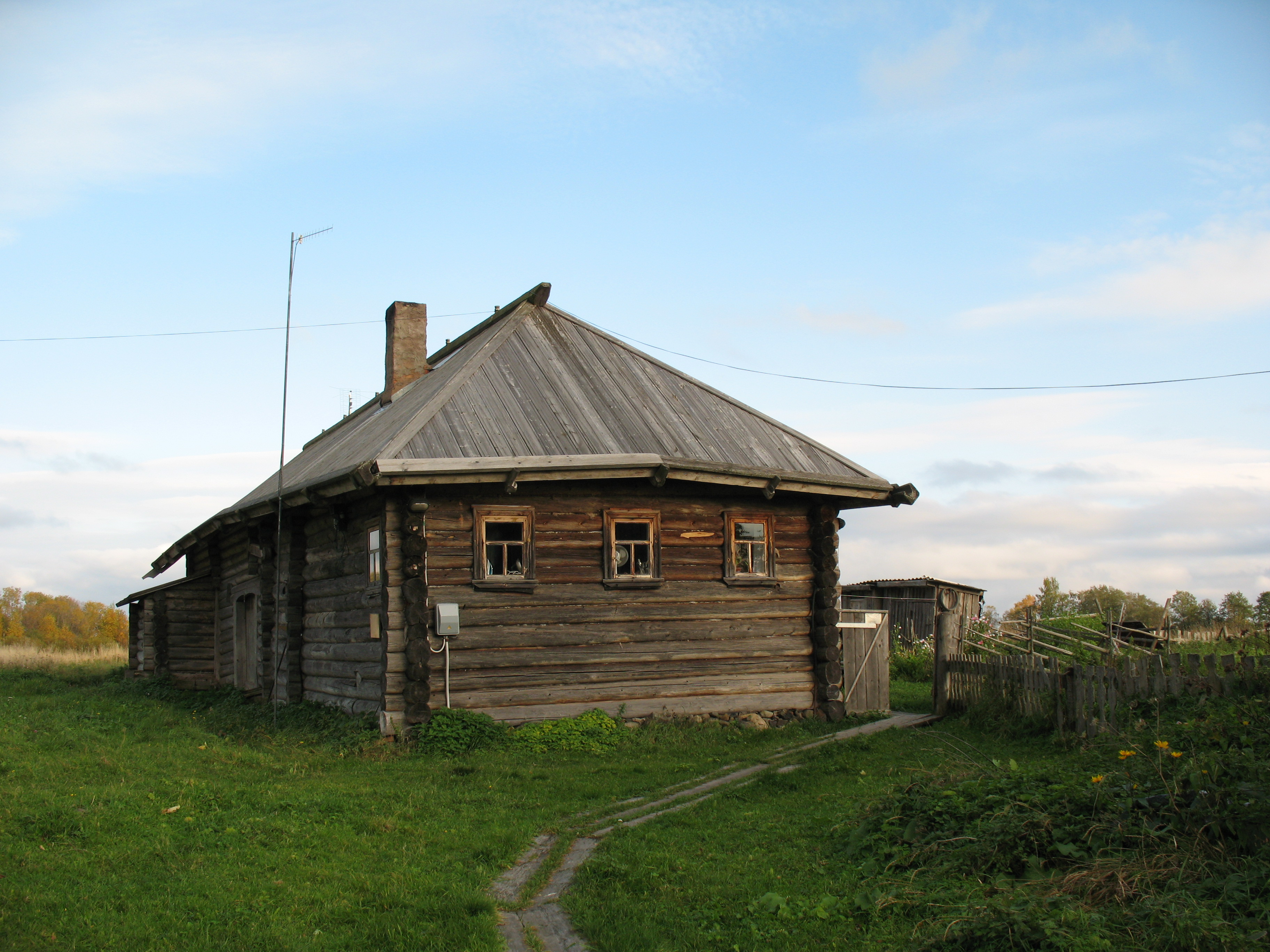 Дом Кондратьева из д. Верхняя Путка (Республика Карелия, Петрозаводск, о. Кижи, д. Васильево)